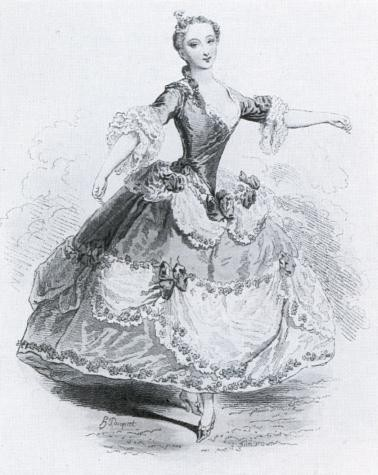 Портрет Марии Салле танцовщица и балетмейстер XVIII века